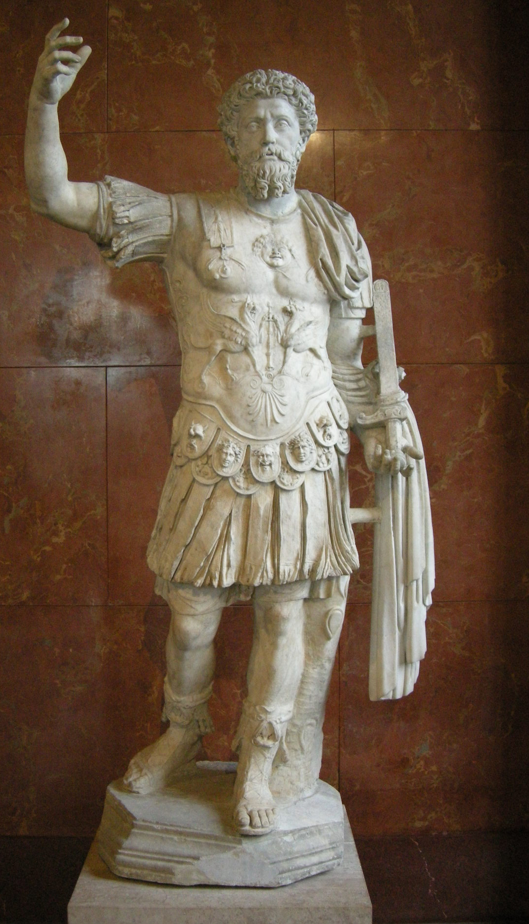 Marc'Aurelio, da Gabi, fine II secolo d.C.